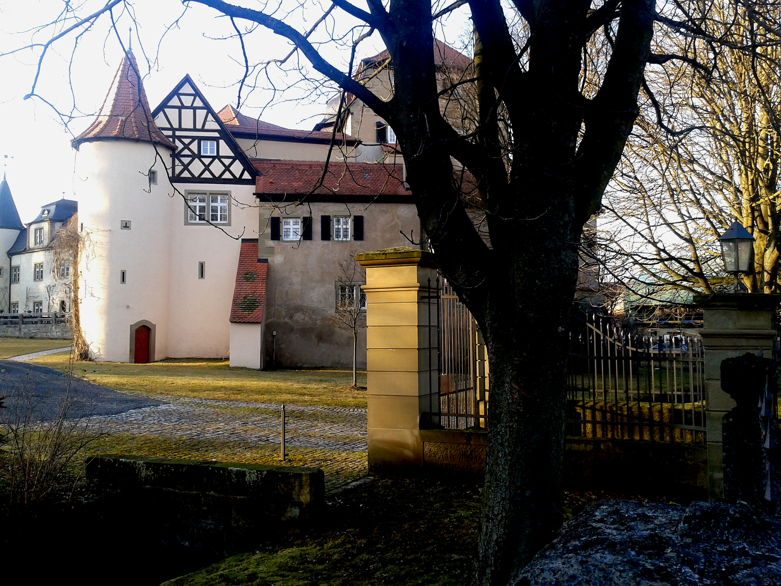 Schloss Rüdenhausen in Rüdenhausen/Unterfranken